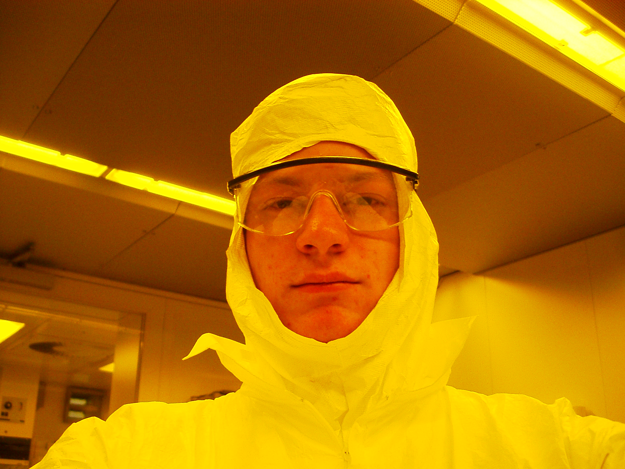 Meine Wenigkeit in Reinraumkleidung (Tyvek)